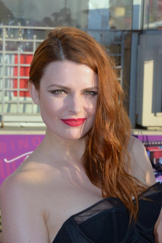 Elodie Frégé au festival de Cabourg